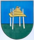 Herb Wsi Turzyczka Obecnie Dzielnicy Wodzisławia Śląskiego